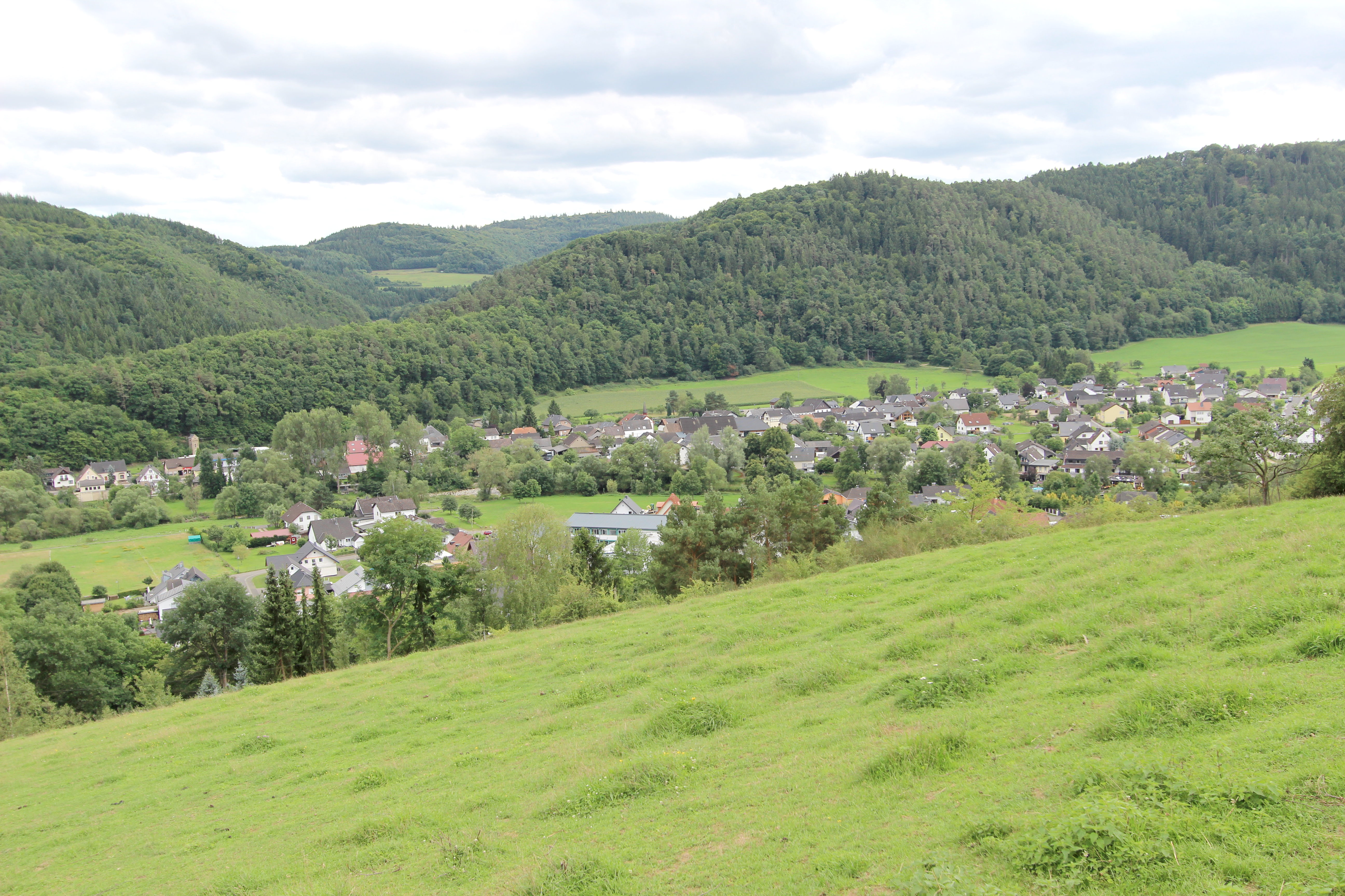 53520 Insul, Blick von der K 25. Aufnahme von 2017.